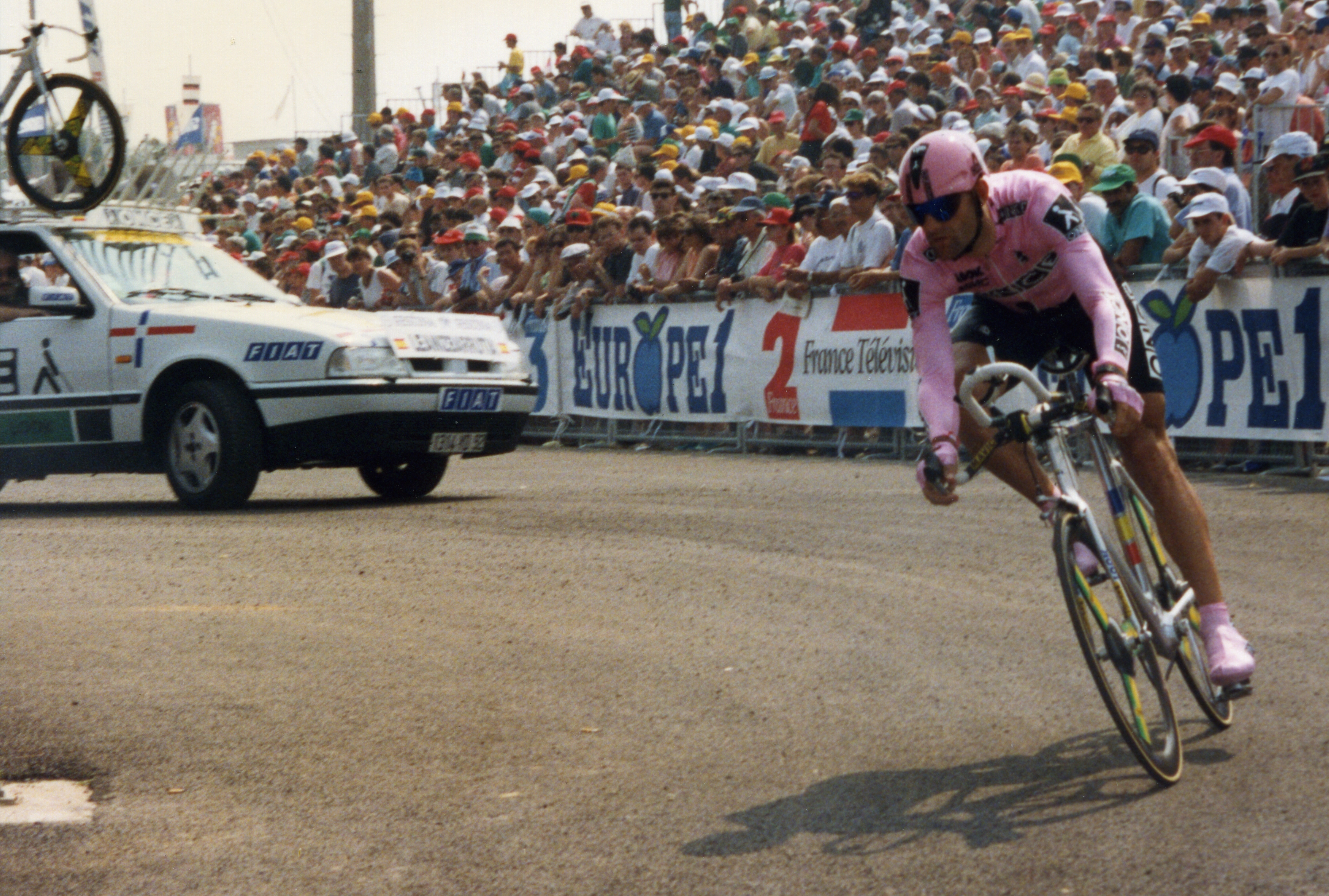 Prologue du TDF 1993